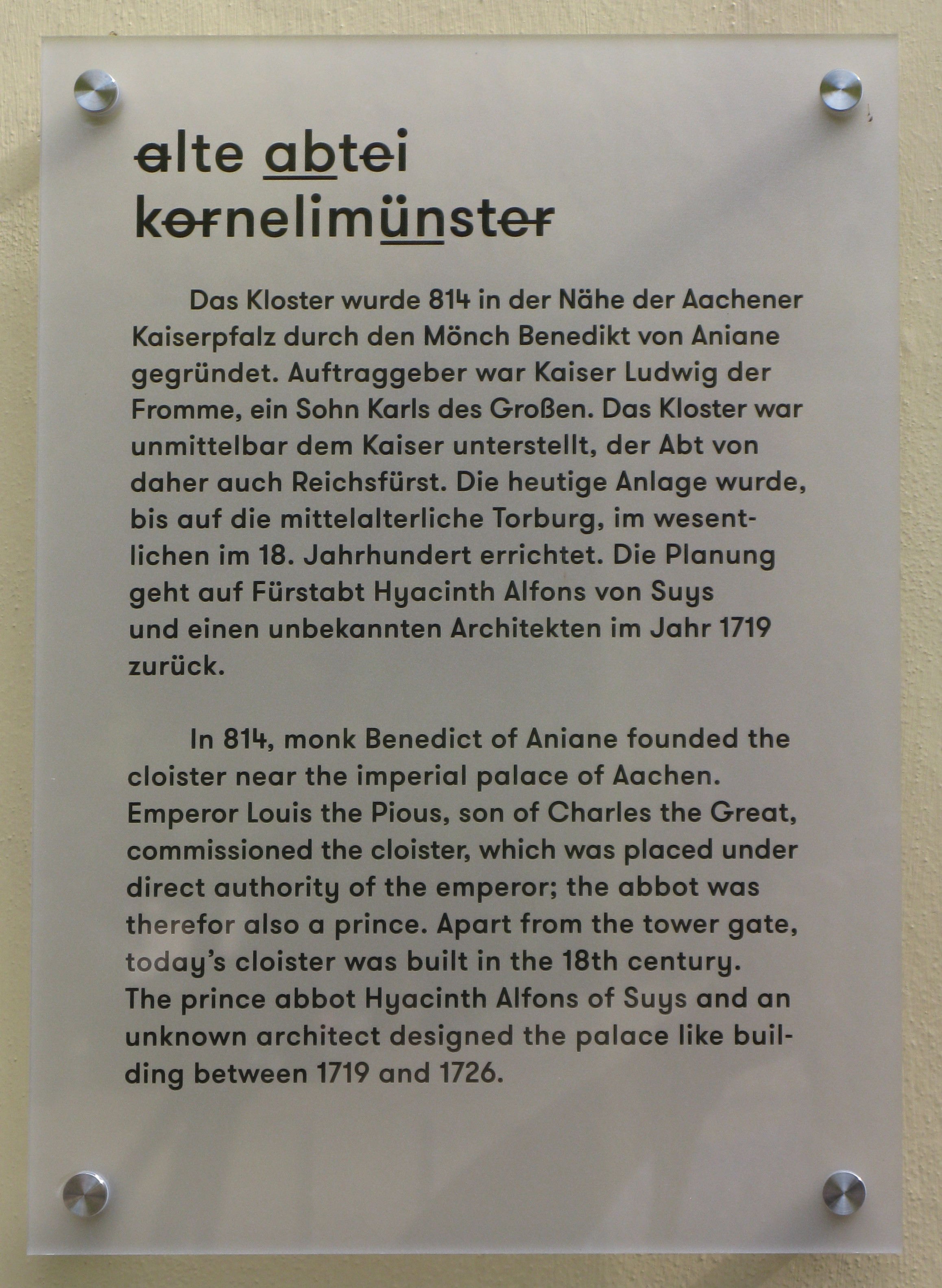 (Aachen-) Kornelimünster; Kunsthaus NRW; Geschichte der Abtei